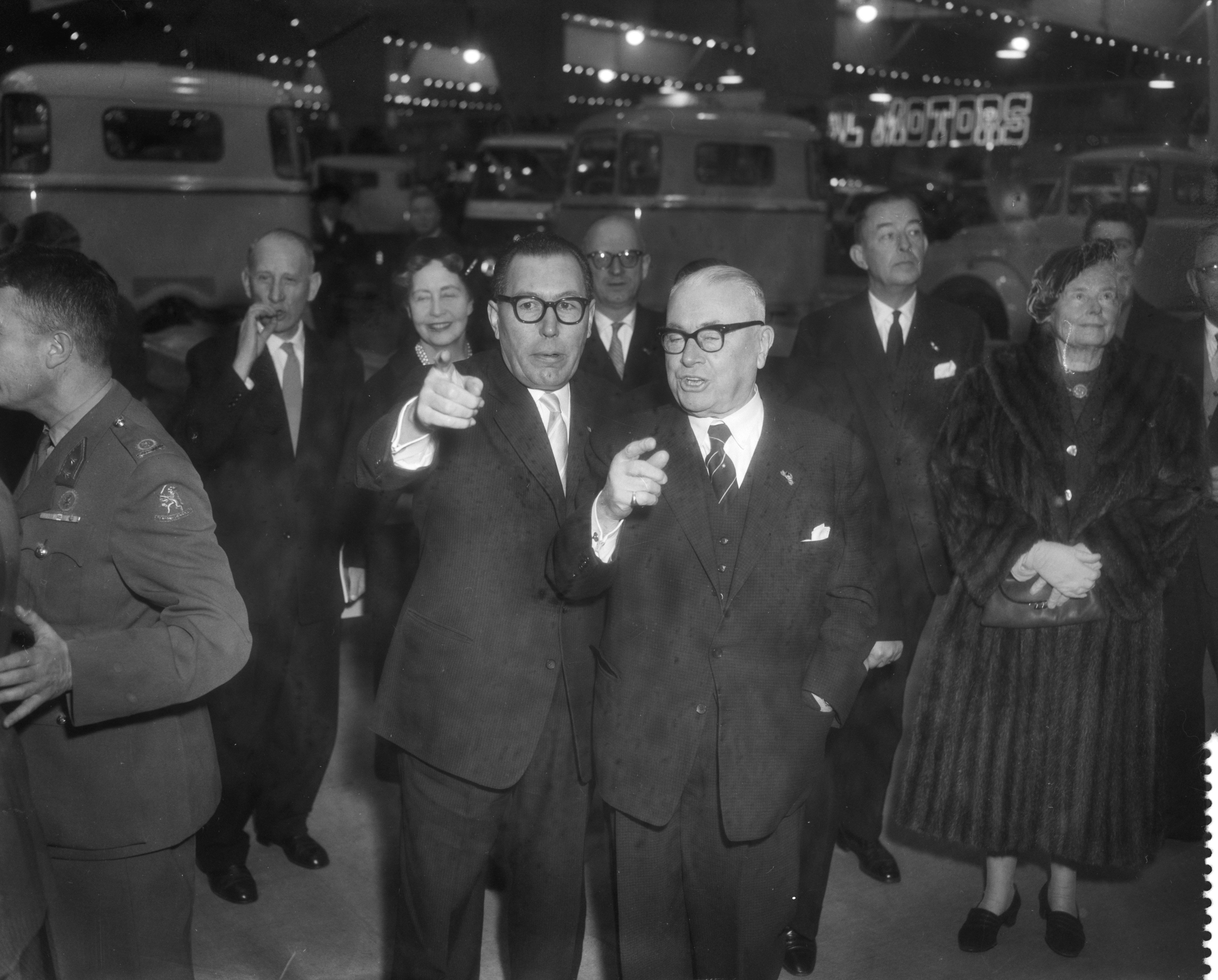 Opening van de veertigste bedrijfsautomobielententoonsteling in de RAI door Mr. L. G. Kortenhorst , links Wim Van Doorne , rechts Mr. L. G. Kortenhorst